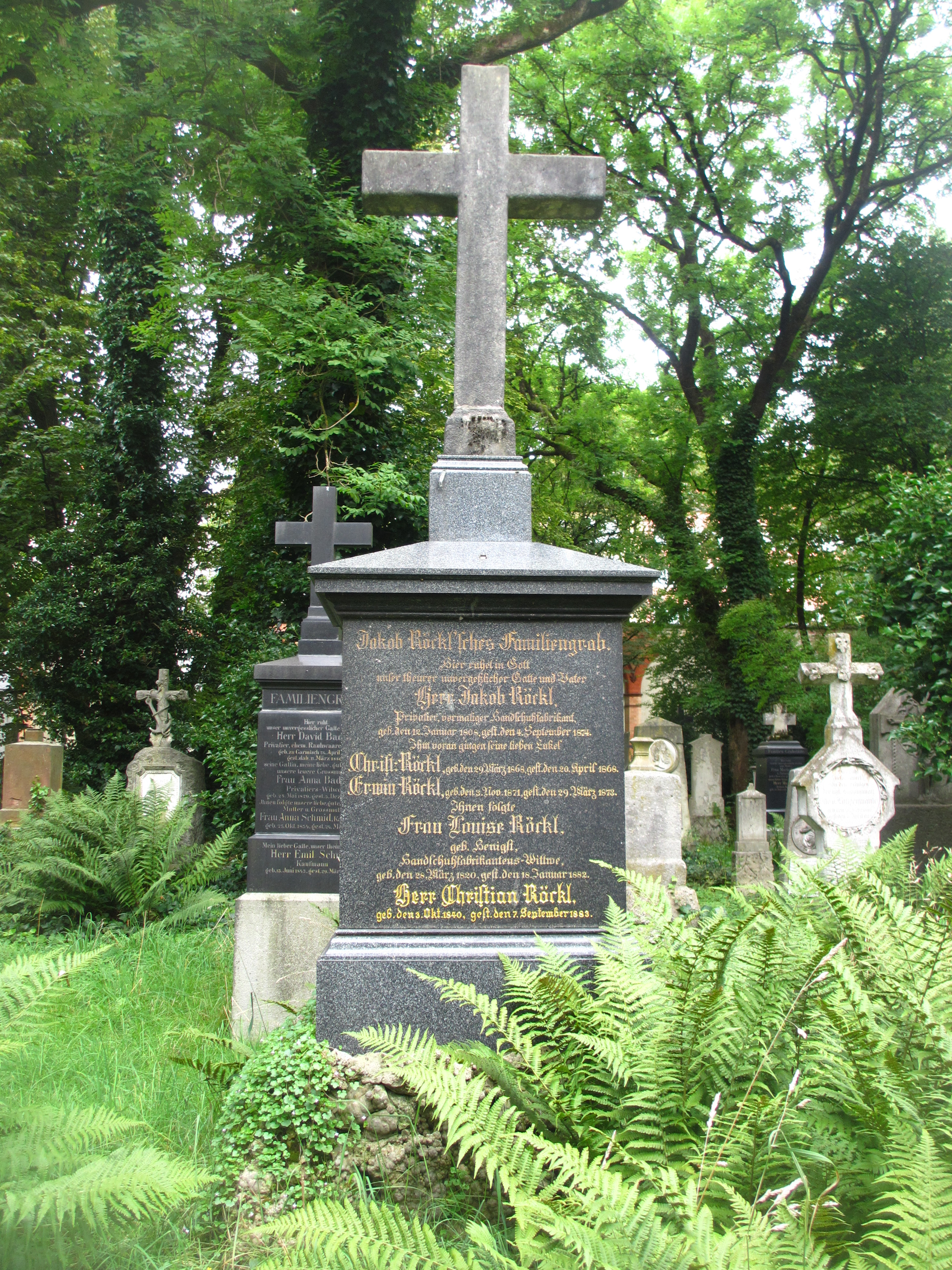 Familiengrab von Jakob Röckl (1808-1874) Christian Röckl (1840-1883) auf dem Alten Suedlichen Friedhof in Muenchen-Graeberfeld GF-34-1-29-30